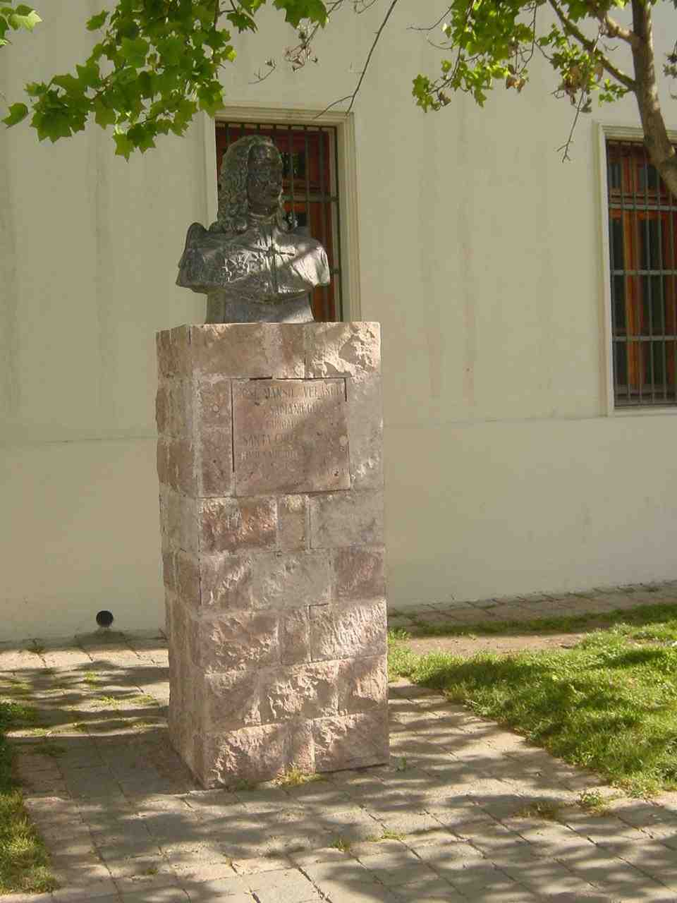 Estatua de Manso de Velasco, Plazuela Marcelino Champagnat (Rancagua, Chile).